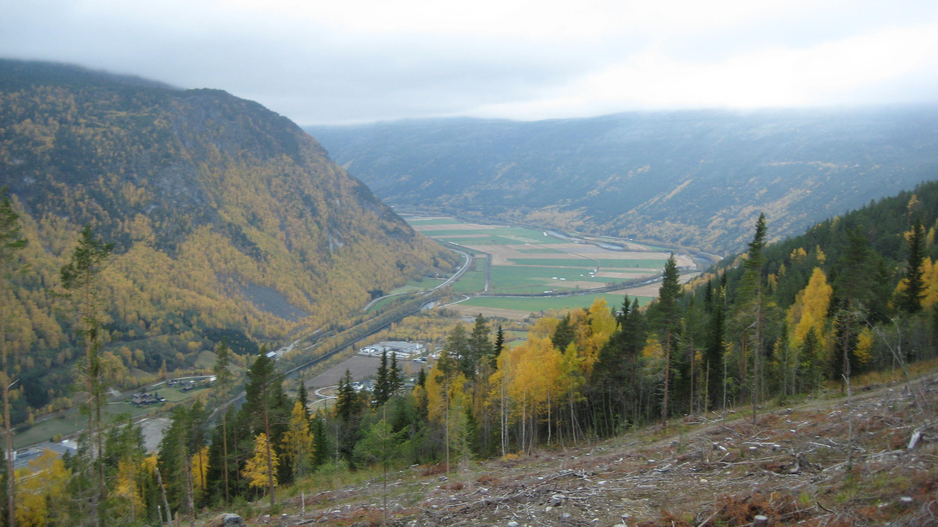 Selsmyrin i Sel kommune